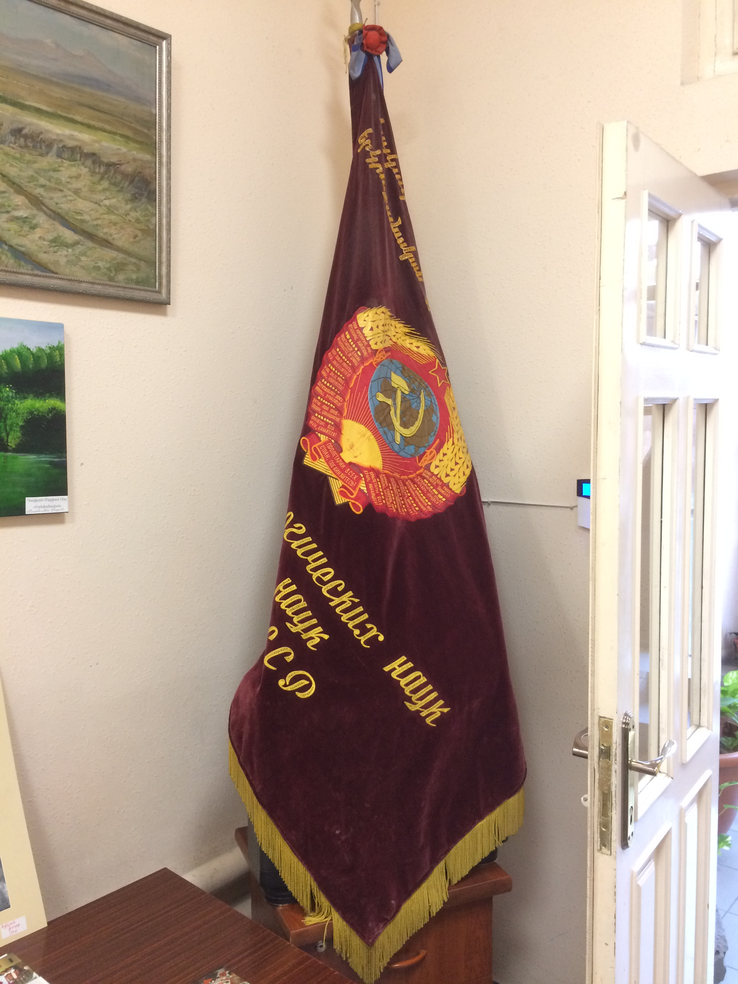 Советский флаг Института геологических наук в Ереване.